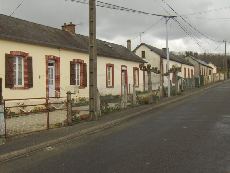 Cités des mines de La Ferrière-aux-Etangs (Orne). Cité minière du Gué-Plat dans la commune de la Ferrière-aux-Etangs, dans le département de l'Orne, non loin de Flers en Normandie.